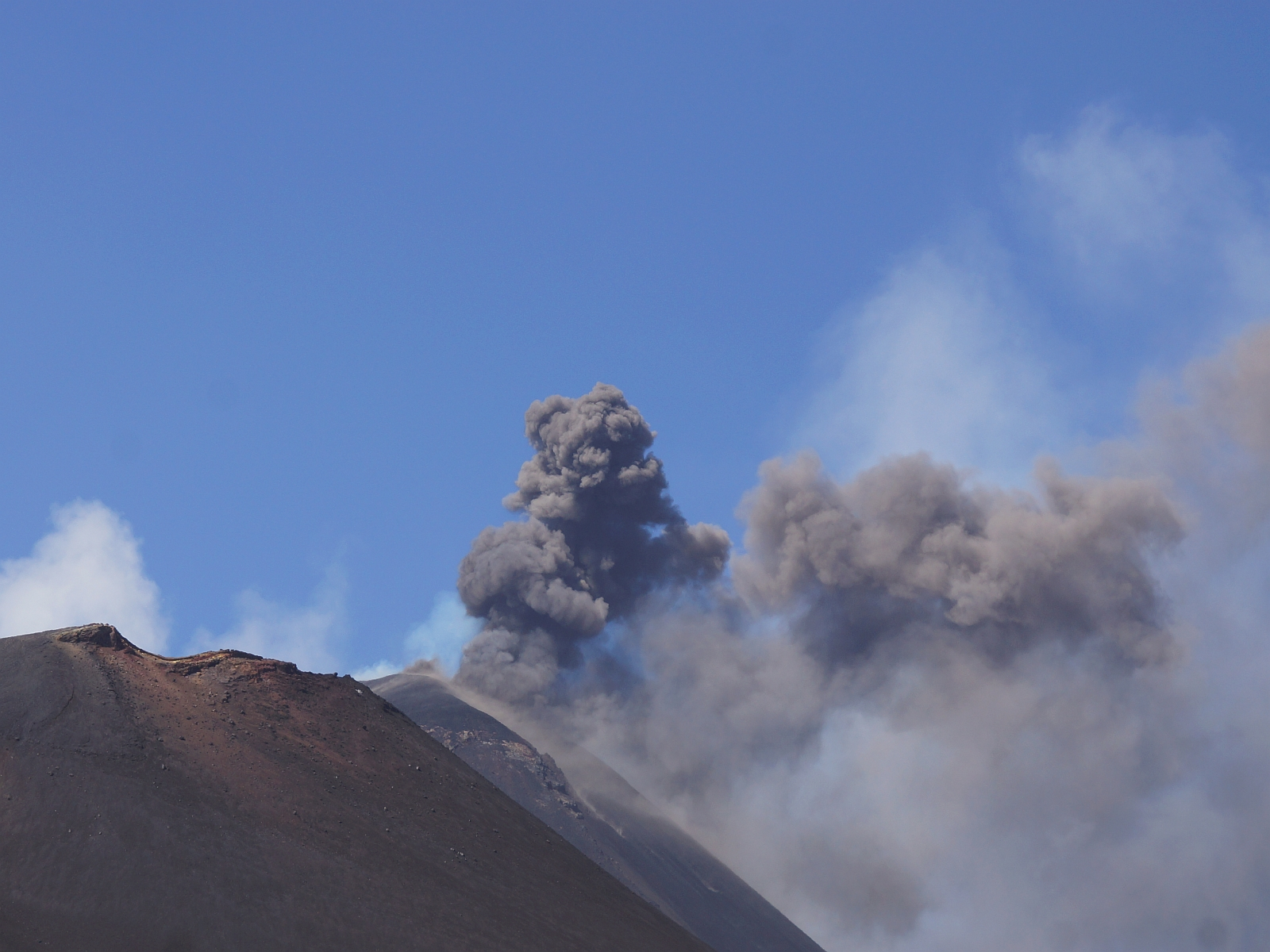 Vulkan Ätna: Paroxysmus. Im August 2014 Paroxysmen am Vulkan Ätna (3329 m hoch), Etna, Mongibello, nahe Catania auf Sizilien, Italy - Foto Wolfgang Pehlemann